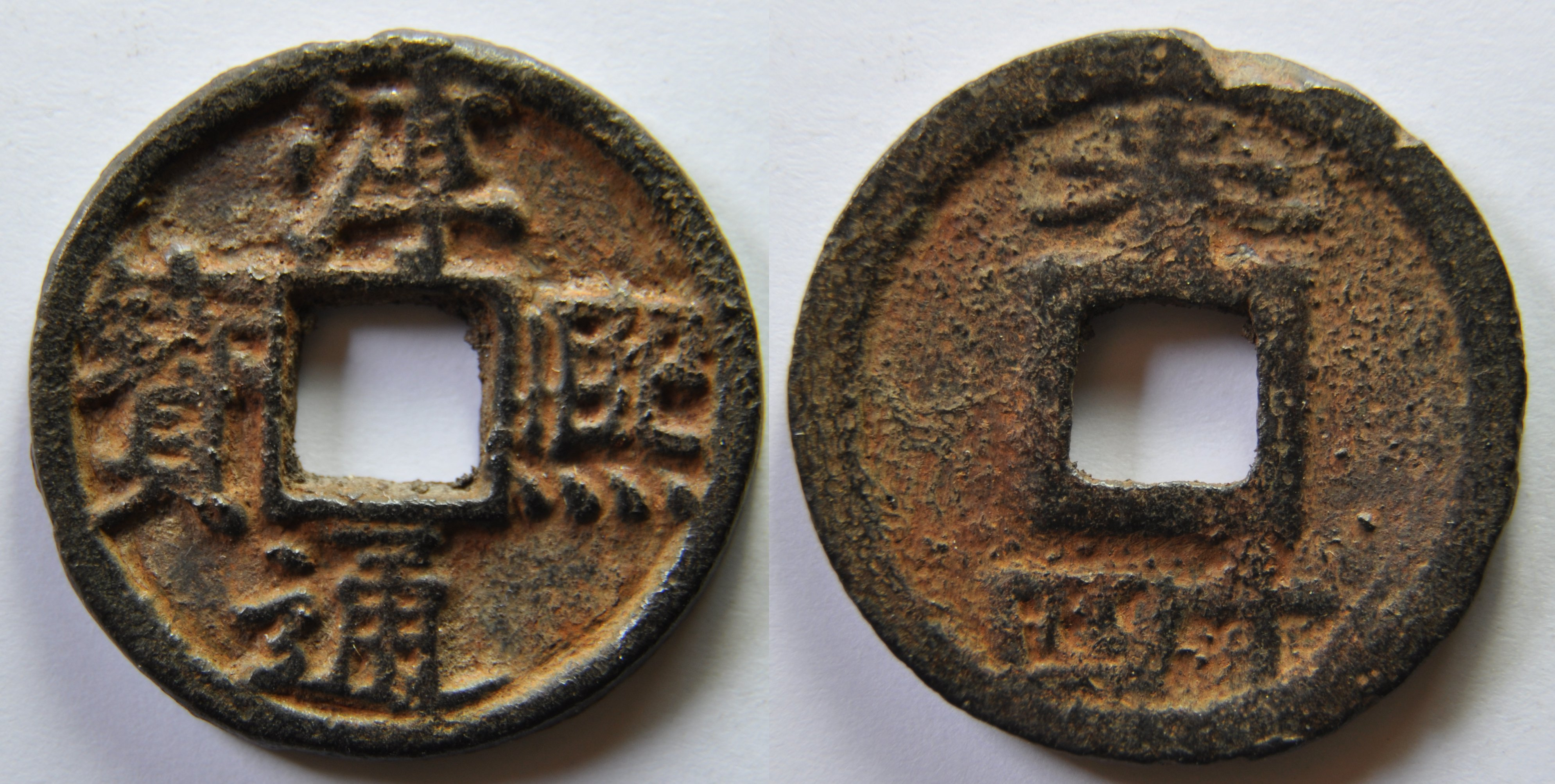 Une monnaie en fer de 2 sapèques (2 cash, xiao ping) de l'empereur Xiao Zong (1163-1190), ère Chun Xi (1174-1189), de l'atelier de Qichun au Hubei, datée de 1187 en écriture régulière et lecture en croix. A/ Chun Xi tong bao (Monnaie courante de Chun Xi) R/ Chun shi si (Chun pour Qichun et 14 pour l'année 14 de l'ère Chun Xi) Dimension : 28,05 mm Poids : 6,7 g. Référence : H17.304 Indice de rareté : 13, très commune d'après D.Hartill Remarque : On fabrique des monnaies en fer sur la frontière avec l'empire Jin par exemple à Qichun au Hubei. On y a fabriqué environ 200.000 ligatures en 1185. A partir de 1180, l'usage est de mettre l'année de fabrication dans l'ère au revers comme contrôle de la qualité. Chine monnaie Song du Sud Monnaies de la dynastie des Song du Sud